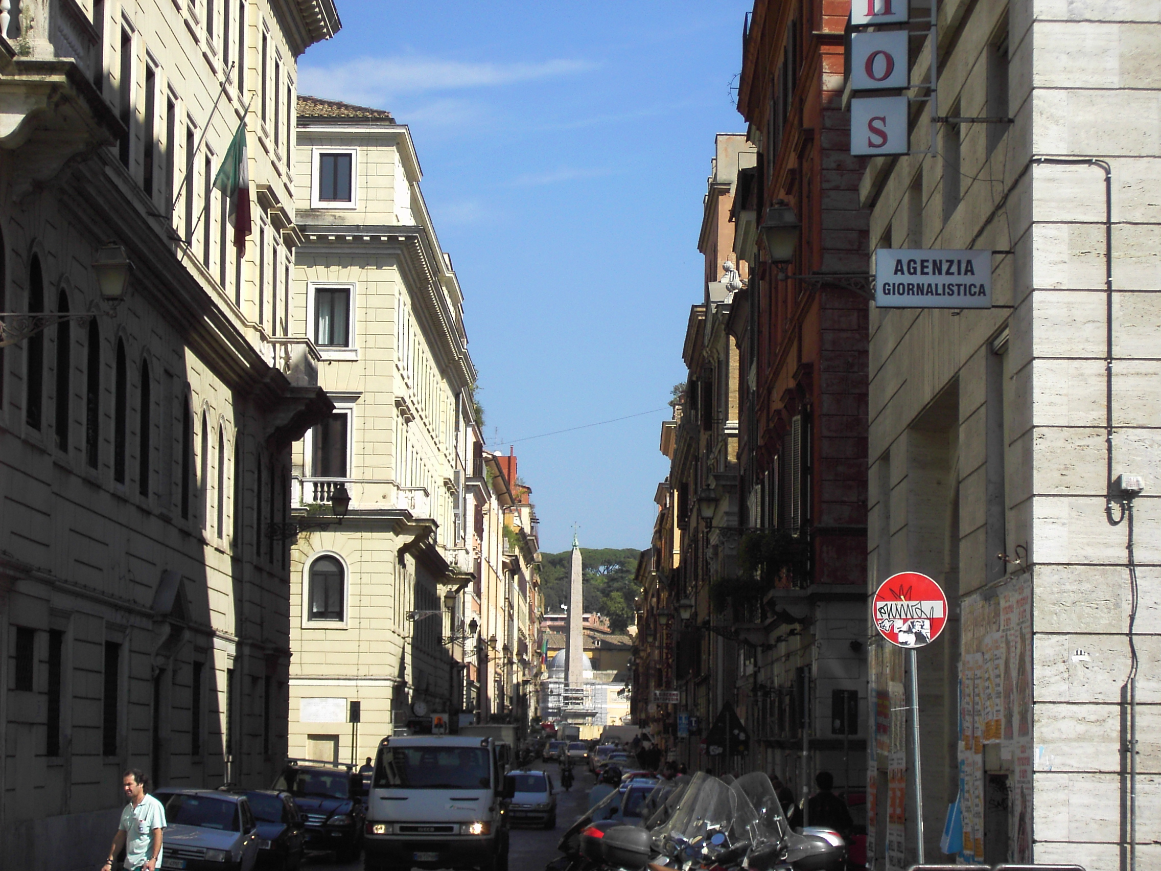 Roma, via di Ripetta verso piazza del Popolo.